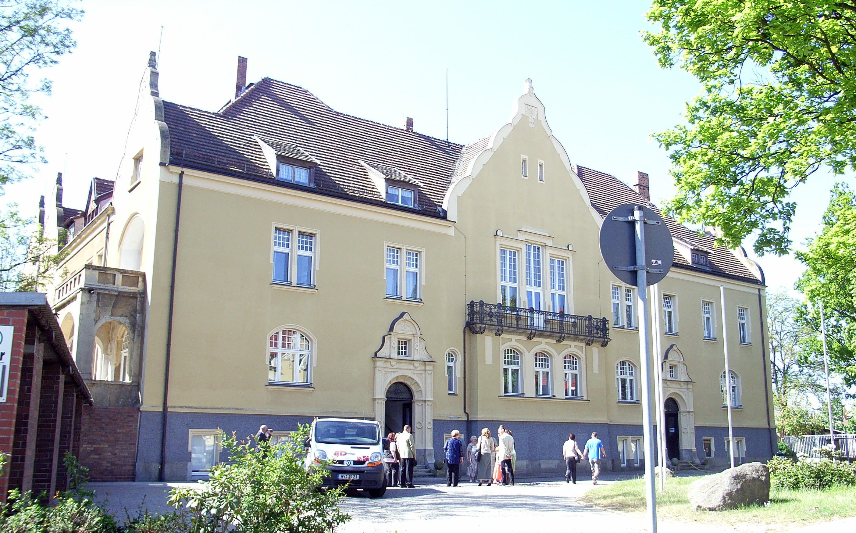 Hoyerswerda, Neues Rathaus Map: 51° 26′ 6″ N, 14° 14′ 35″ E